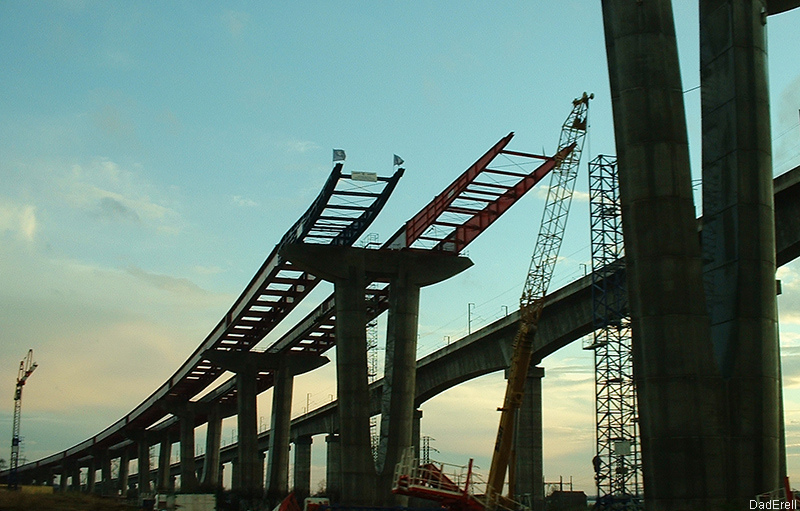 Travaux du second viaduc de La Boisse dans l'Ain, relatif à la construction de l'A432.